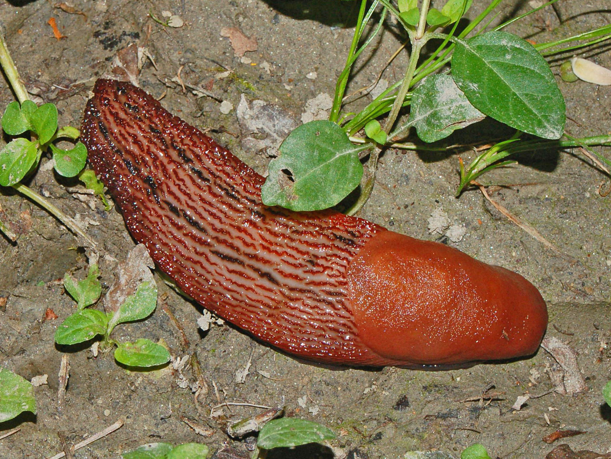 A live individual of Limax dacampi - Cerreto Ratti, Alessandria, Italy